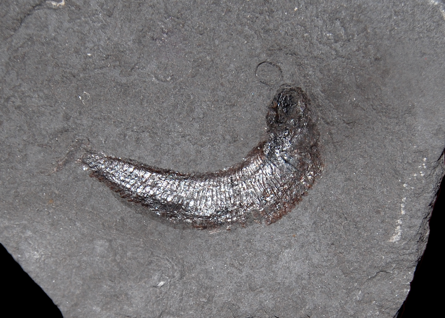 Naturhistorisches Museum Wien